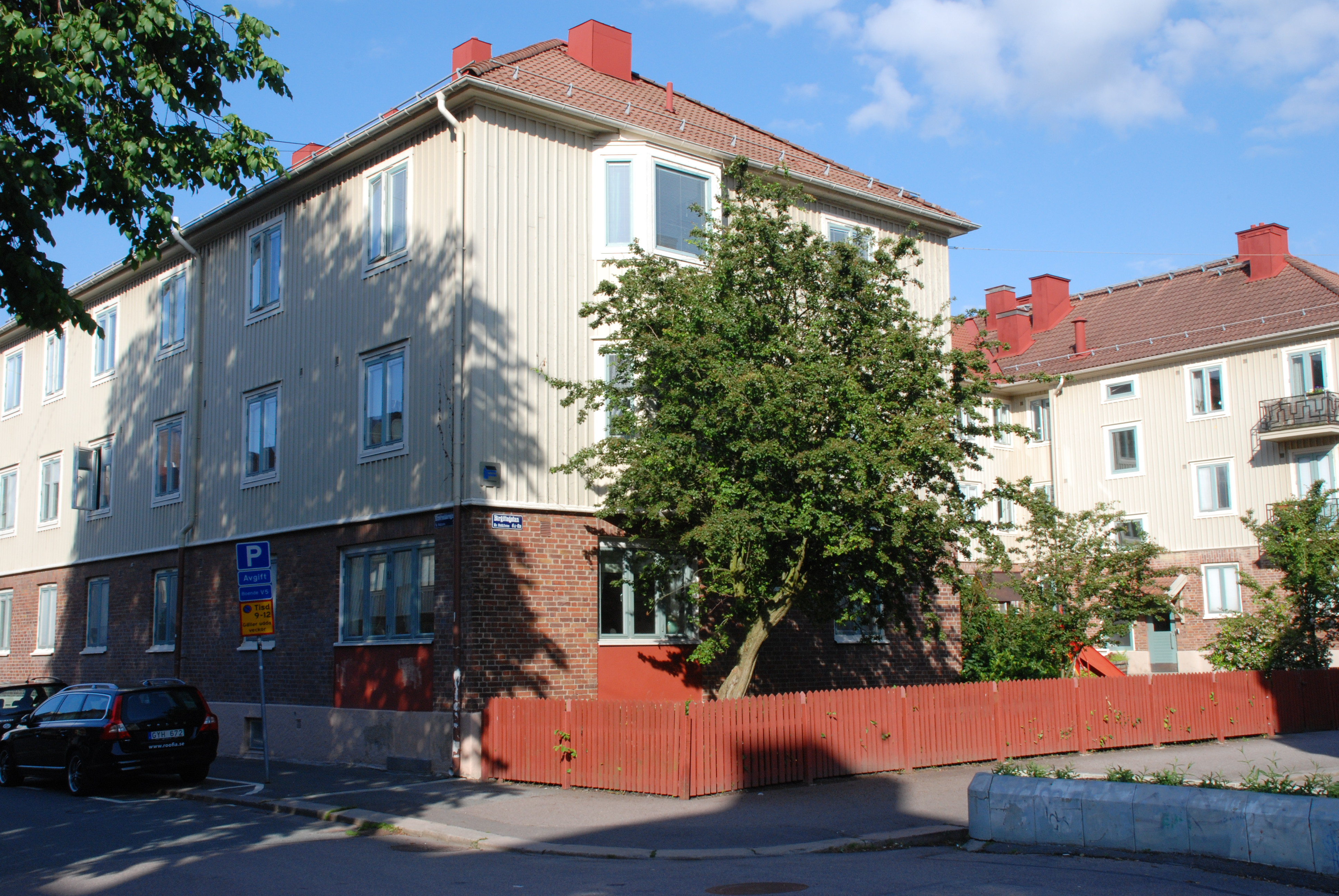 Kvarteret Rödklinten, Kustroddaregatan/Birgittagatan 6, i stadsdelen Kungsladugård i Göteborg.